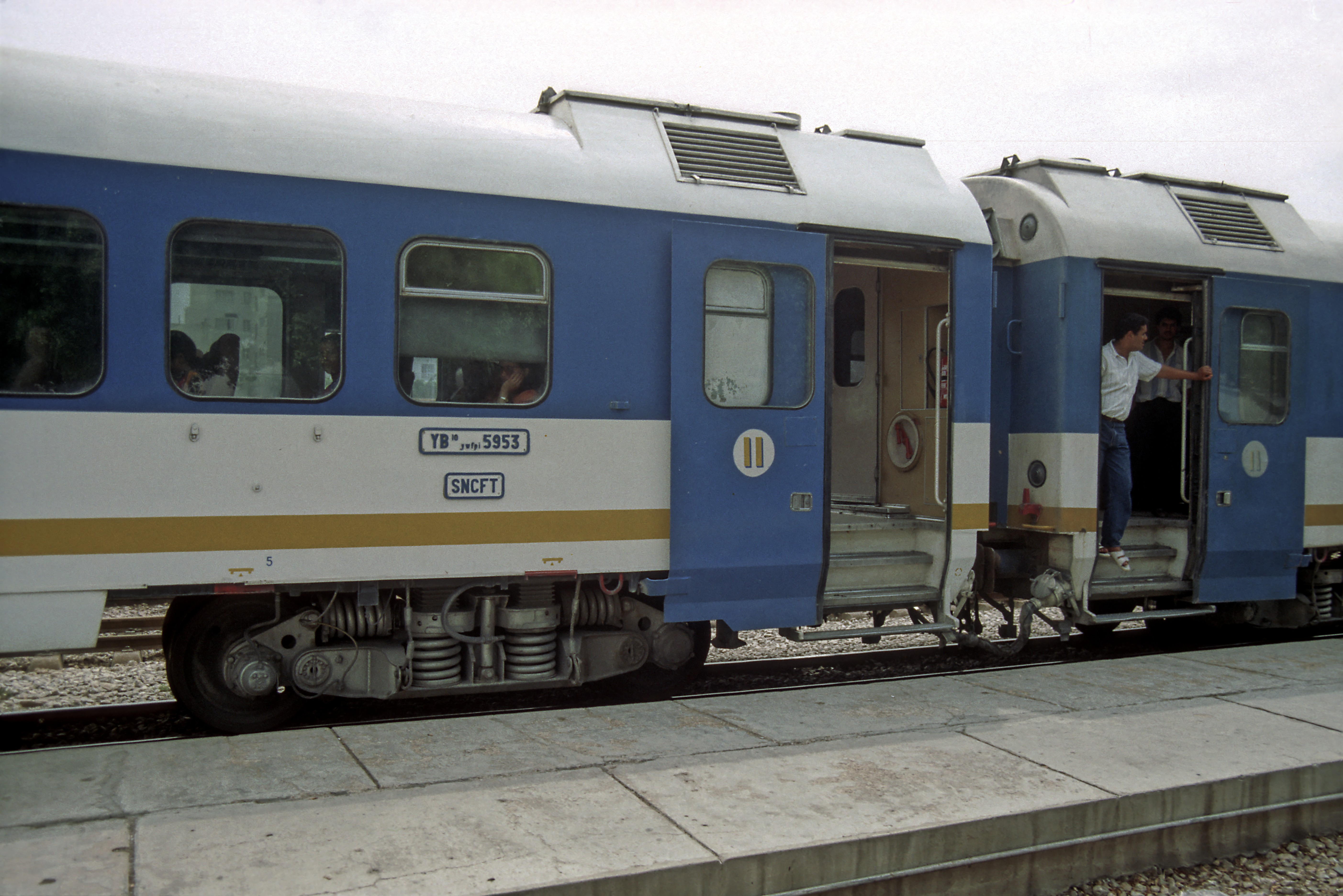 Einstiege und Wagenübergang, die Fahrzeuge sind von ihren Maßen her für Regelspur ausgelegt.